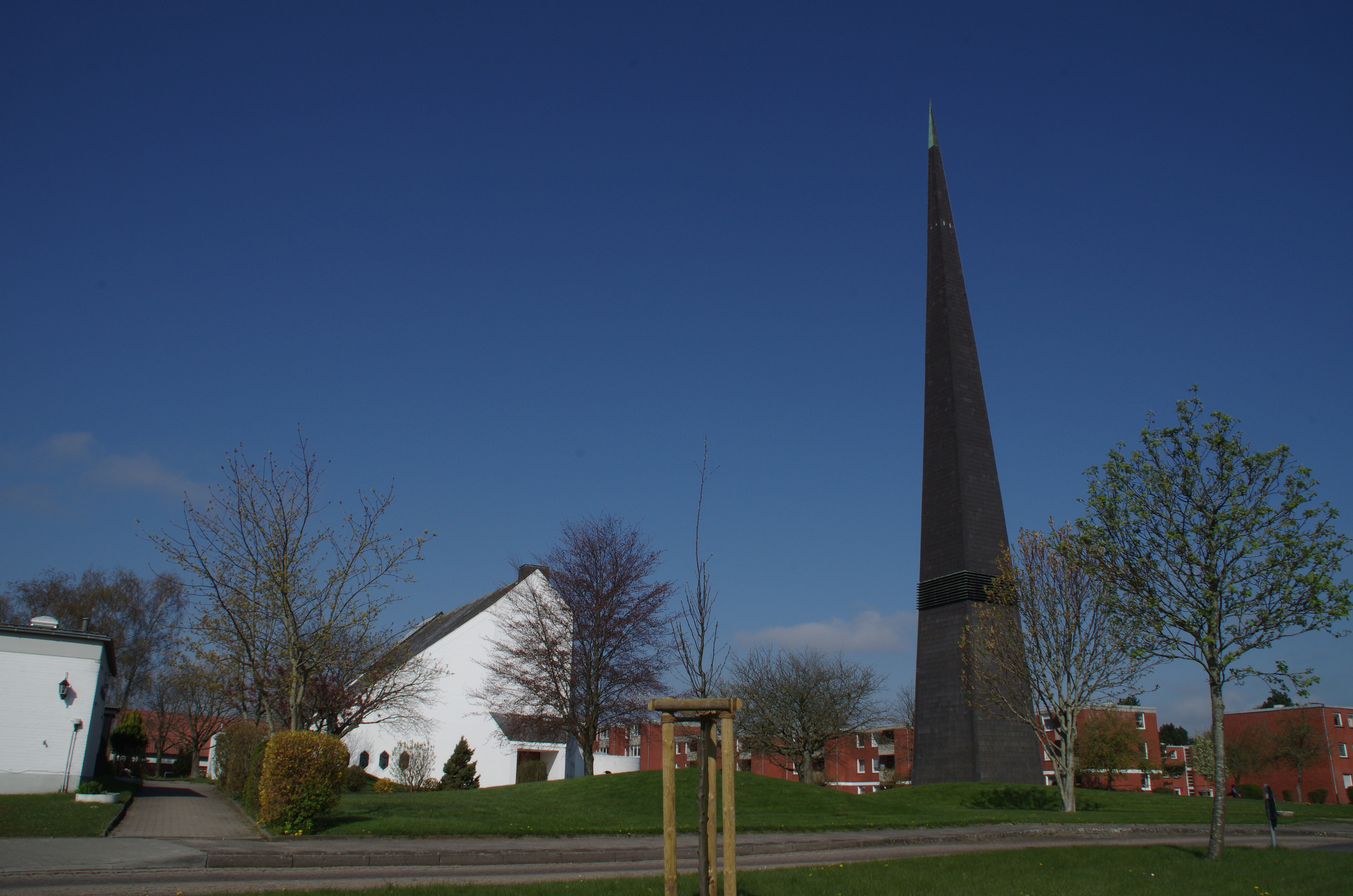 Kappeln, Ortsteil Ellenberg. Die Auferstehungskirche steht unter Denkmalschutz.